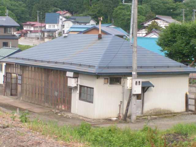 Tsuya Station, Tozawa, Yamagata, Japan